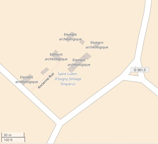 Carte